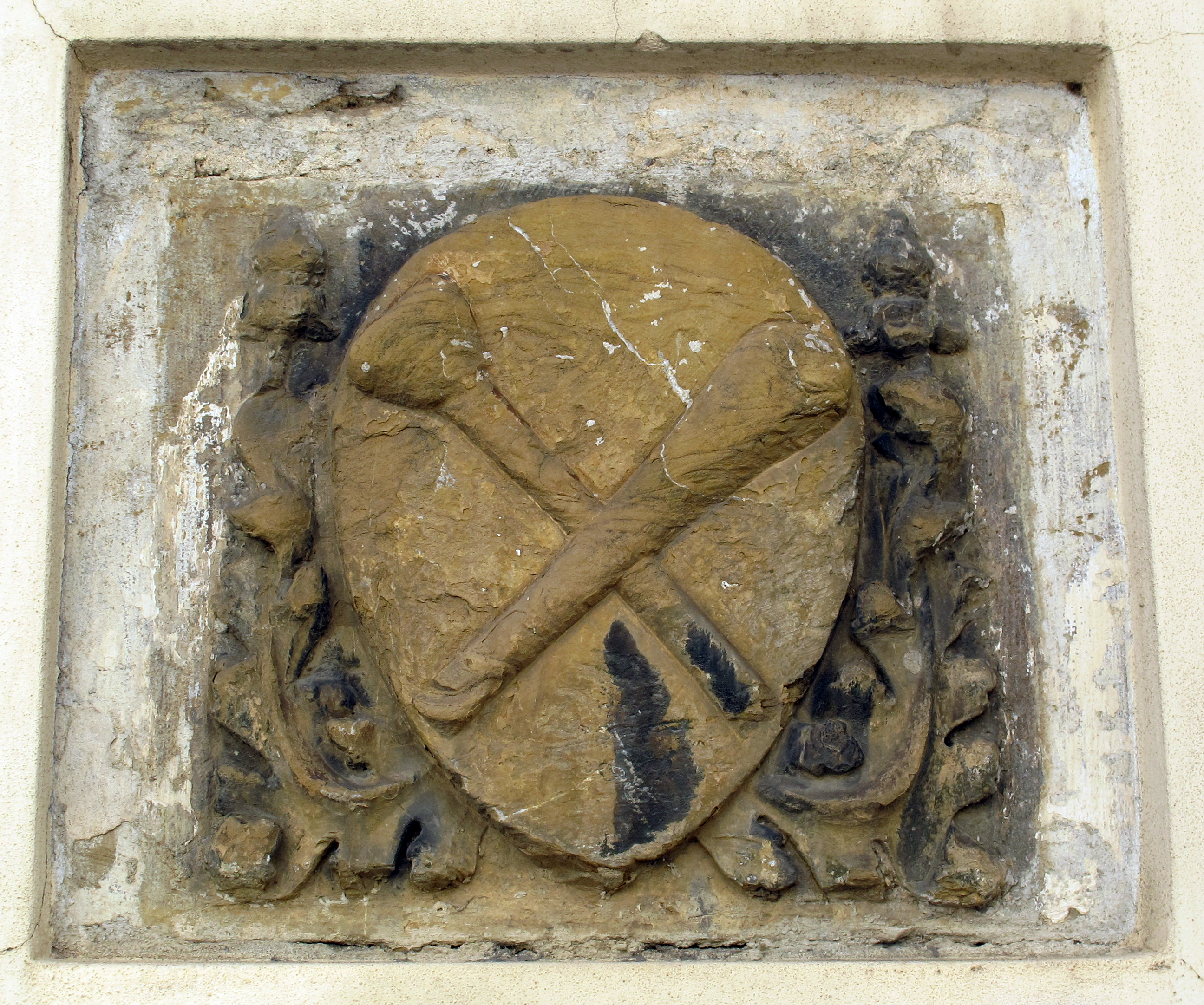 Via delle casine, tabernacolo dei tintori, stemma tintori